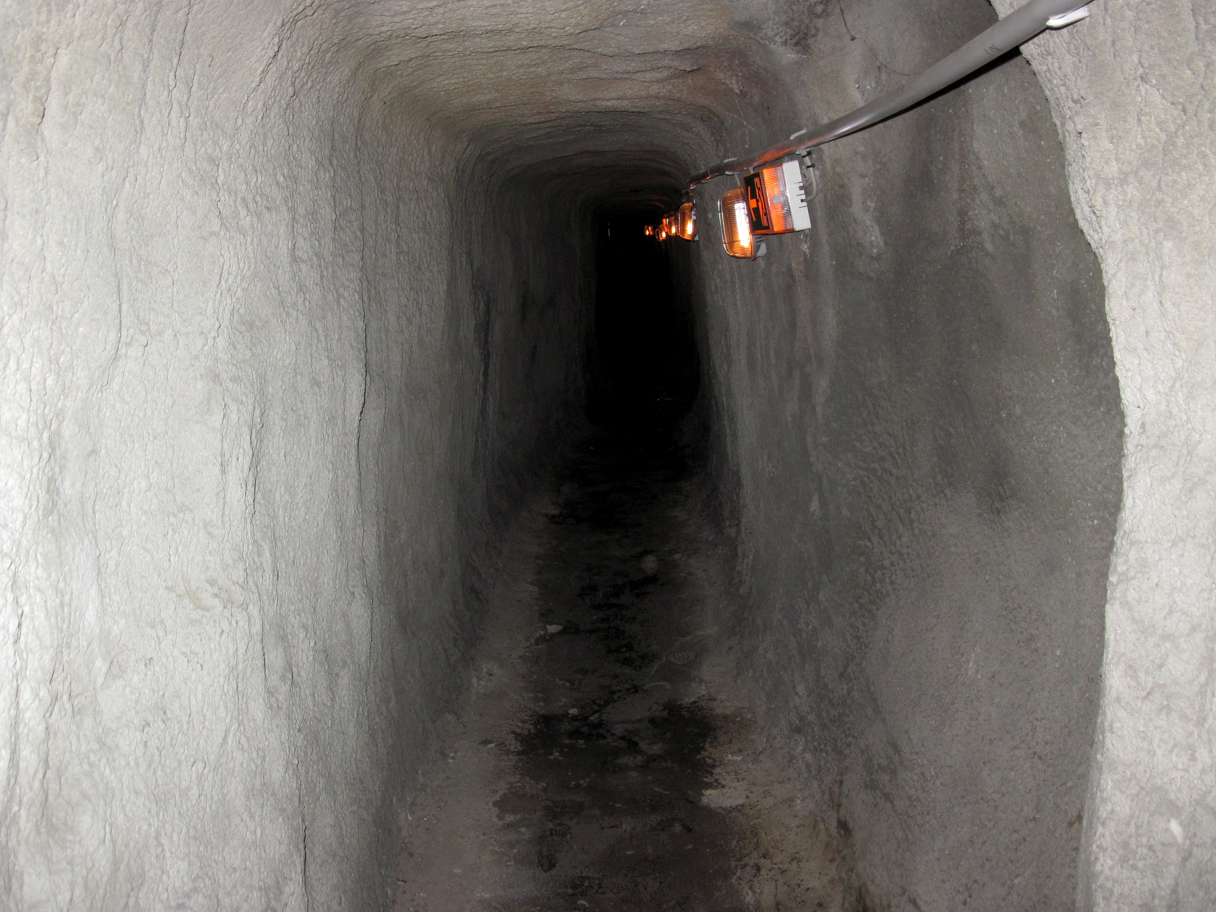 Stichgang von Keller zu Keller